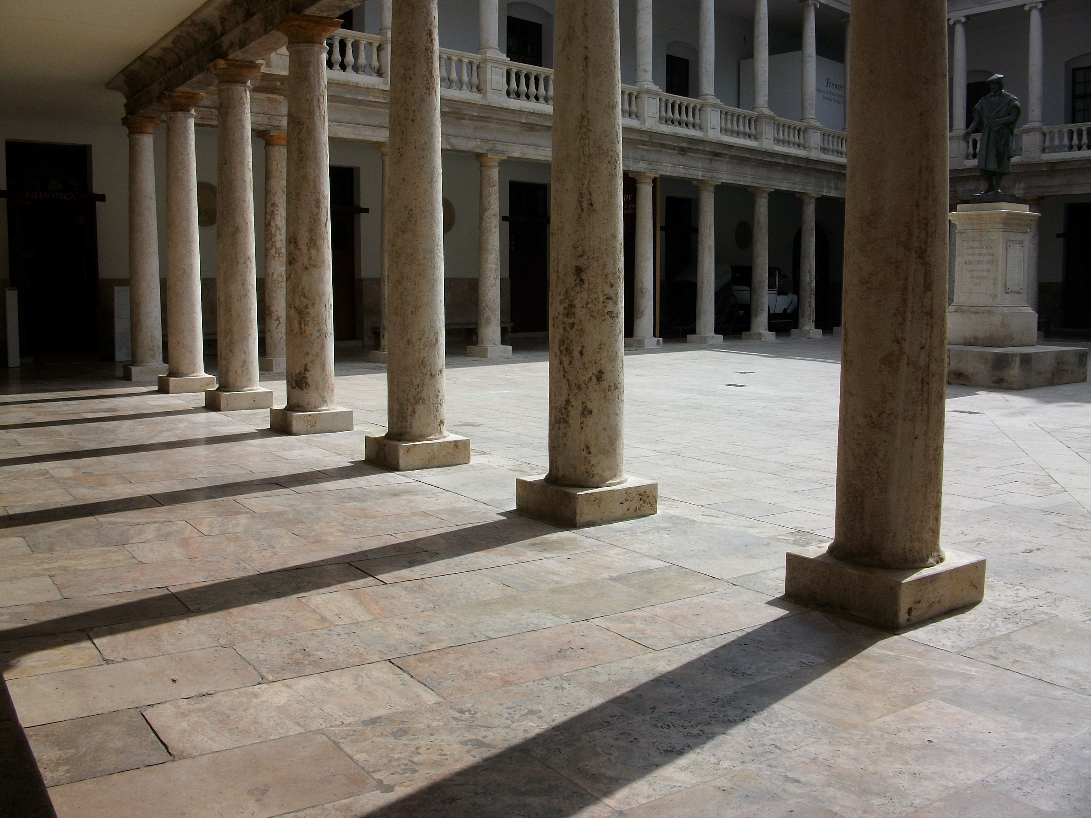 Claustre de la Nau, edifici històric de la Universitat de València.